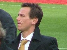 Foto van Leon Vlemmings, de van oorsprong assistent-trainer van Feyenoord in het seizoen 2008/2009. In 2009 actief als interim-trainer.